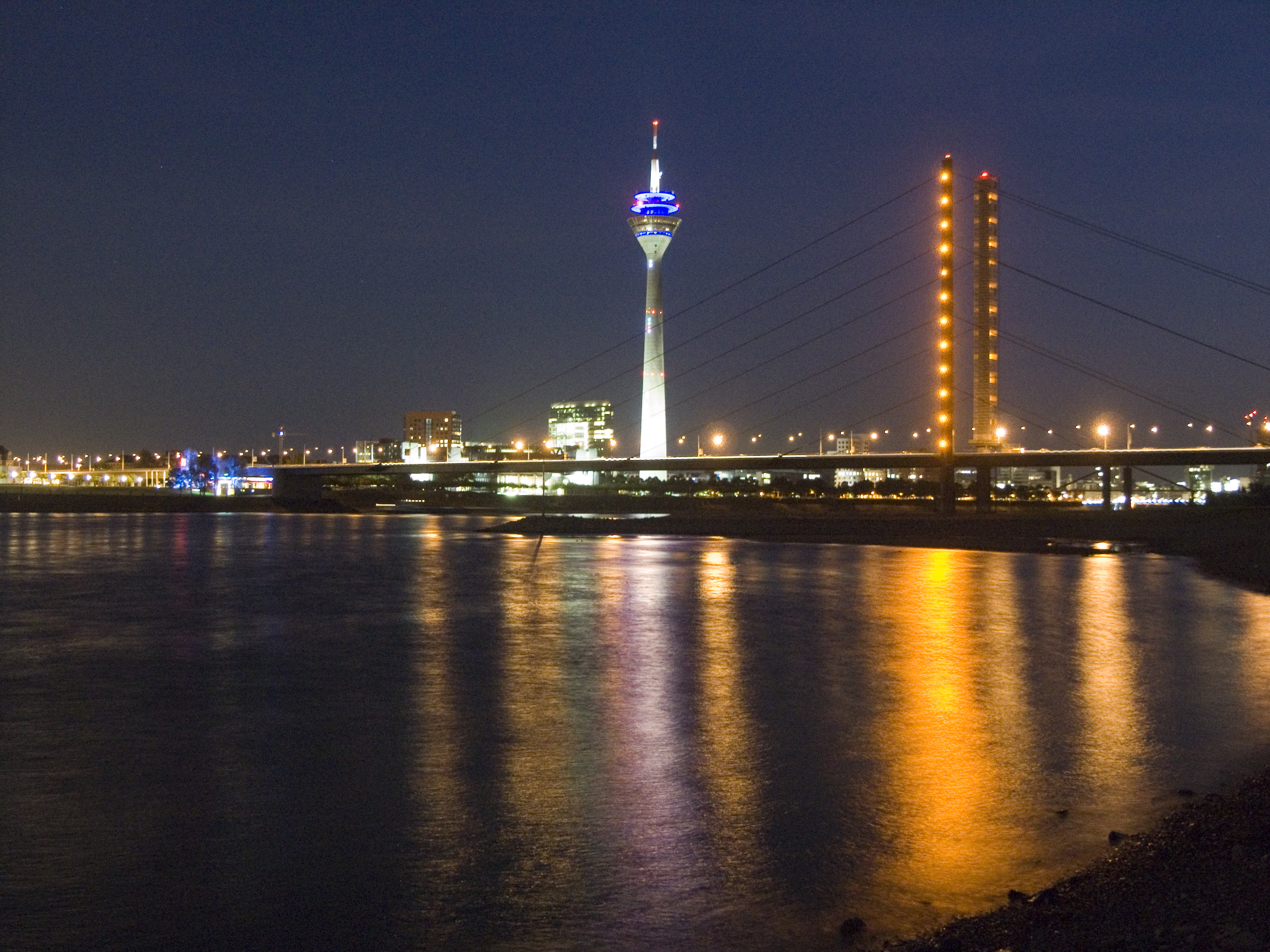 Северный Рейн-Вестфалия, Дюссельдорф - мост Rheinkniebrücke